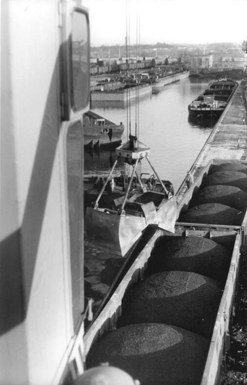 Eisenhüttenstadt, Binnenhafen Zentralbild Reiche 17.11.70 Bez.Frankfurt: 9000 Tonnen Tagesleistung- Diese Menge wird täglich im zweitgrößten Binnenhafen der DDR, im Binnenhafen Eisenhüttenstadt, umgeschlagen. UBz: den Hafenportalkran bei der Kohleentladung. Die 300 Waggons, die täglich über das Anschlußgleis der Reichsbahn bewegt werden, sprechen für die Qualität der Zusammenarbeit zwischen der Reichsbahn und der Binnenschiffahrt.